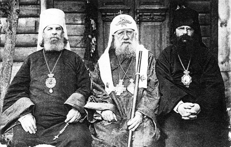 "Одна из самых удачных фотографий Патриарха Тихона, опубликованная во множестве изданий, сделана фотографом Шмидтом у Архиерейского дома в г. Серпухове в 1924 году. На фото помимо Патриарха и Митрополита Петра (Полянского) присутствует Епископ Серпуховской Алексий (Готовцев)."